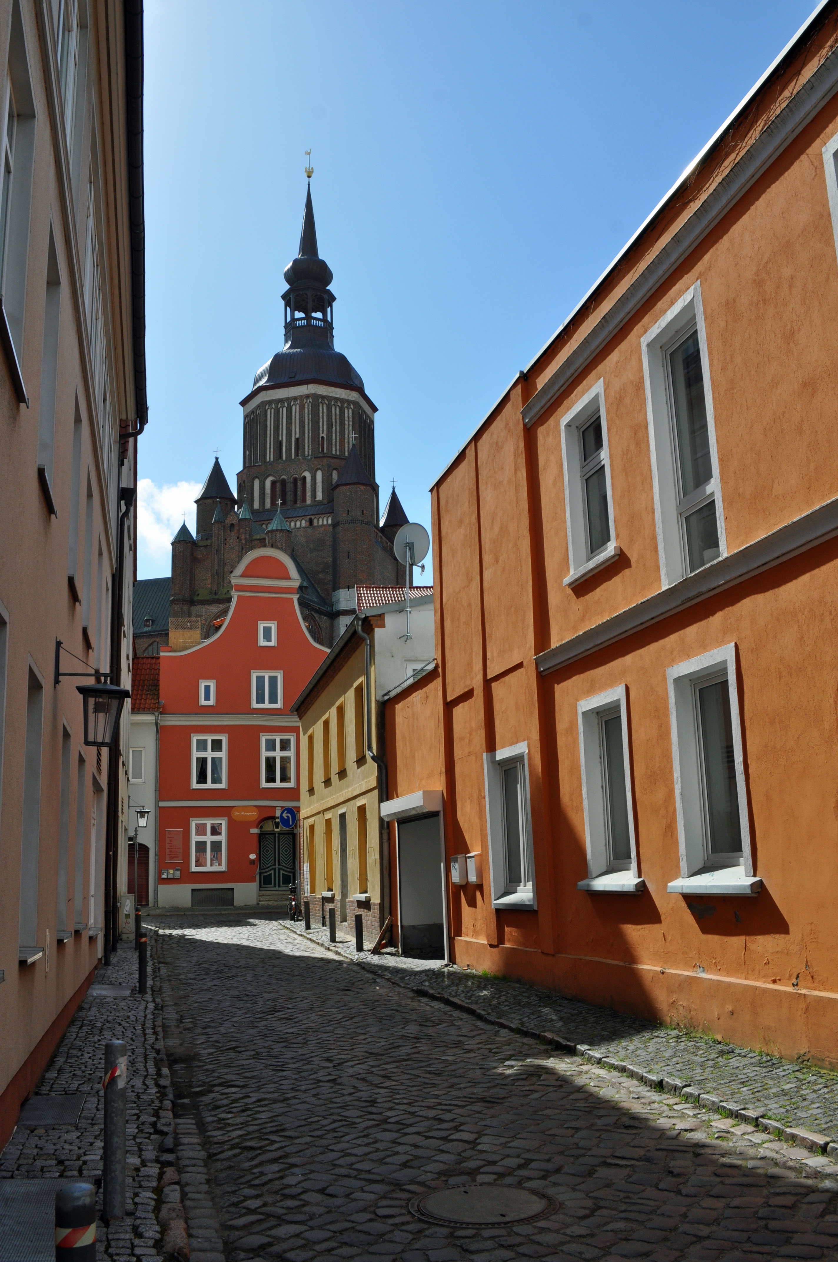 Gebäude in Stralsund, siehe Dateiname